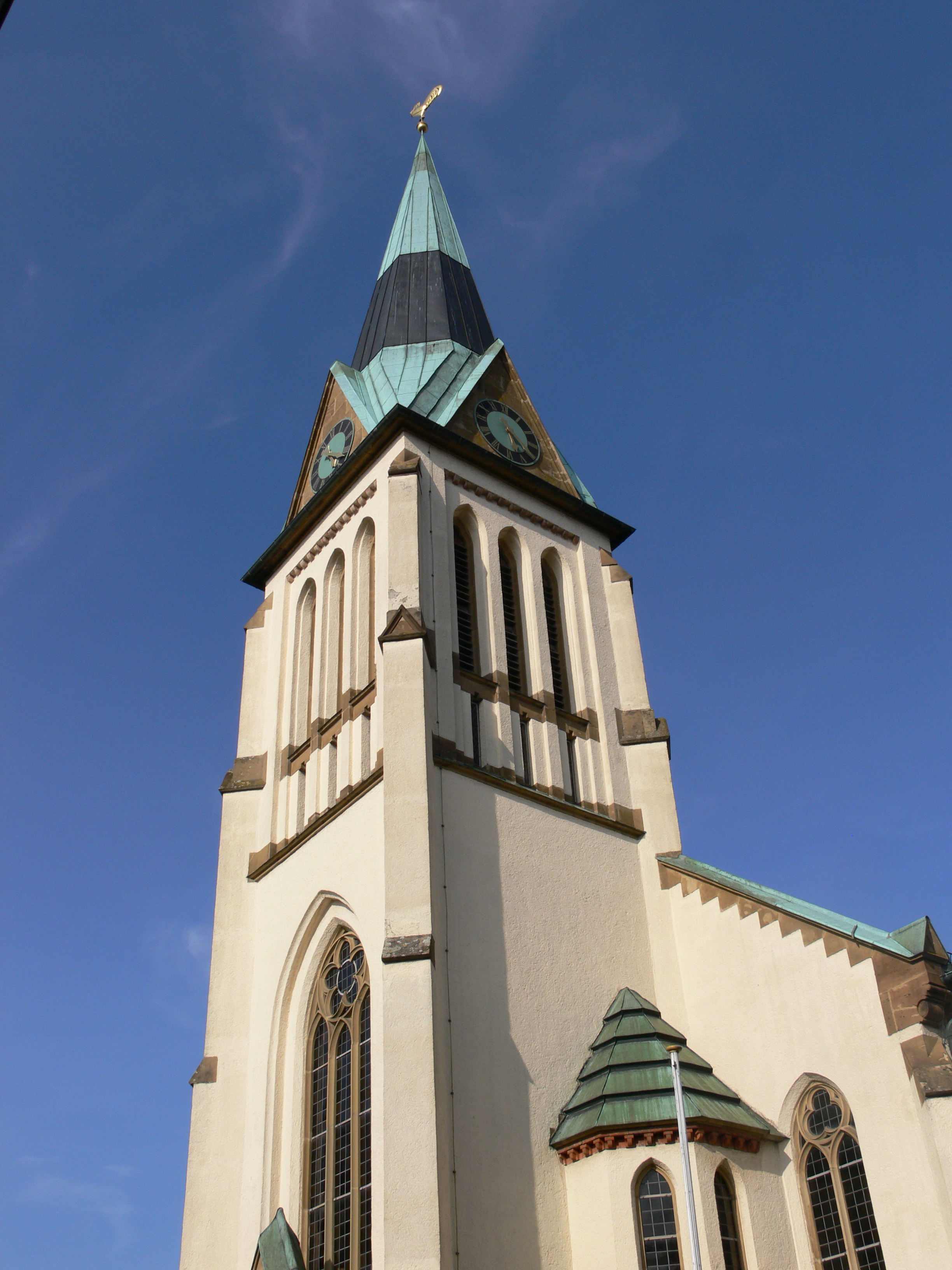 Evangelische Stadtkirche, Abt-Hyller-Straße, Weingarten (Württemberg) Turm